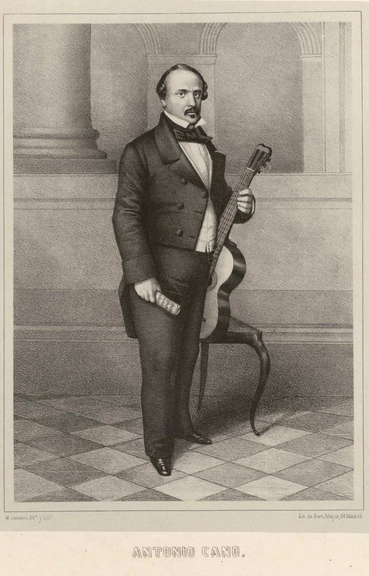 Antonio Cano, litografía de Mariano Bort y Virués por dibujo de M. Jiménez. Biblioteca Nacional de España